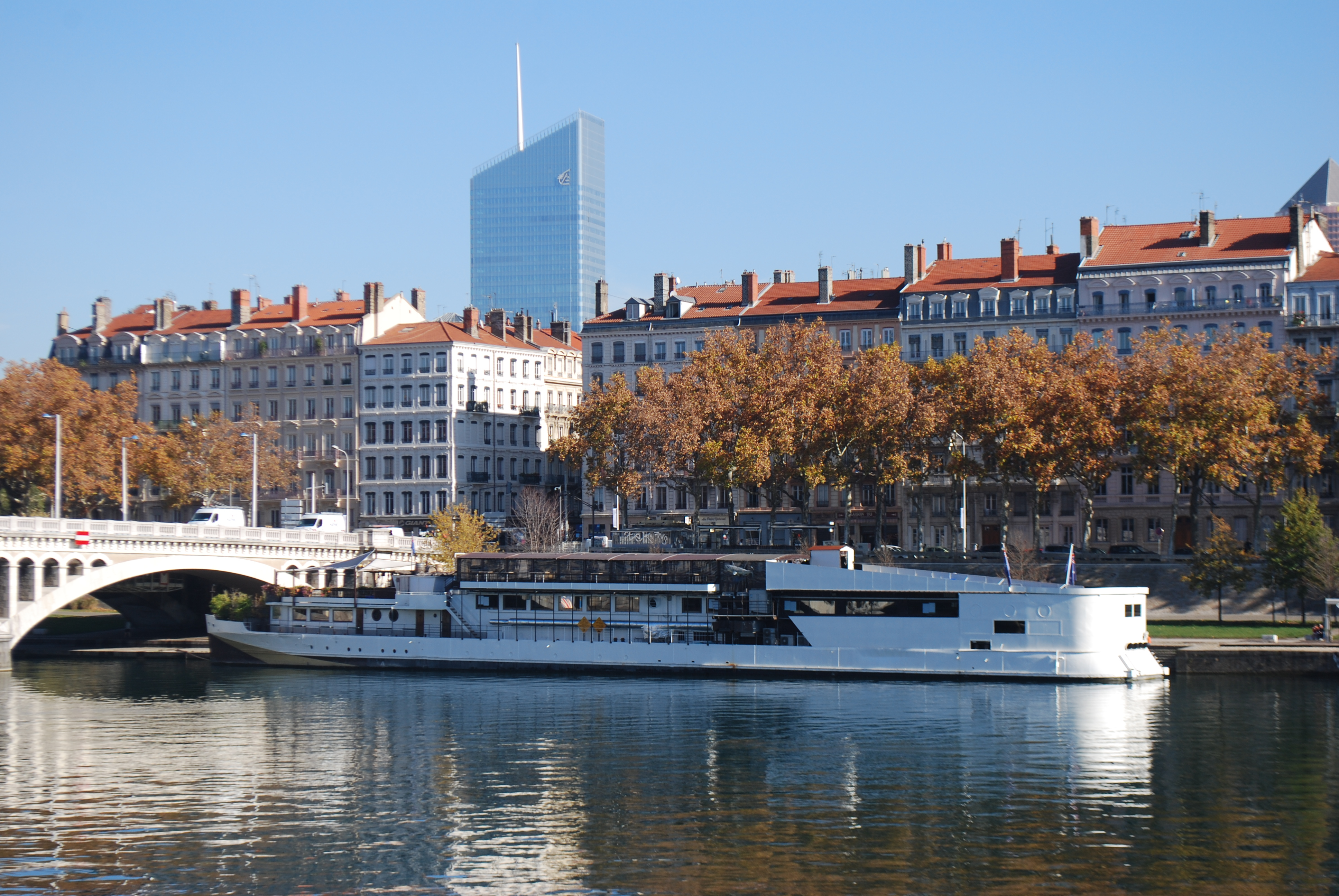 Vue de Lyon.